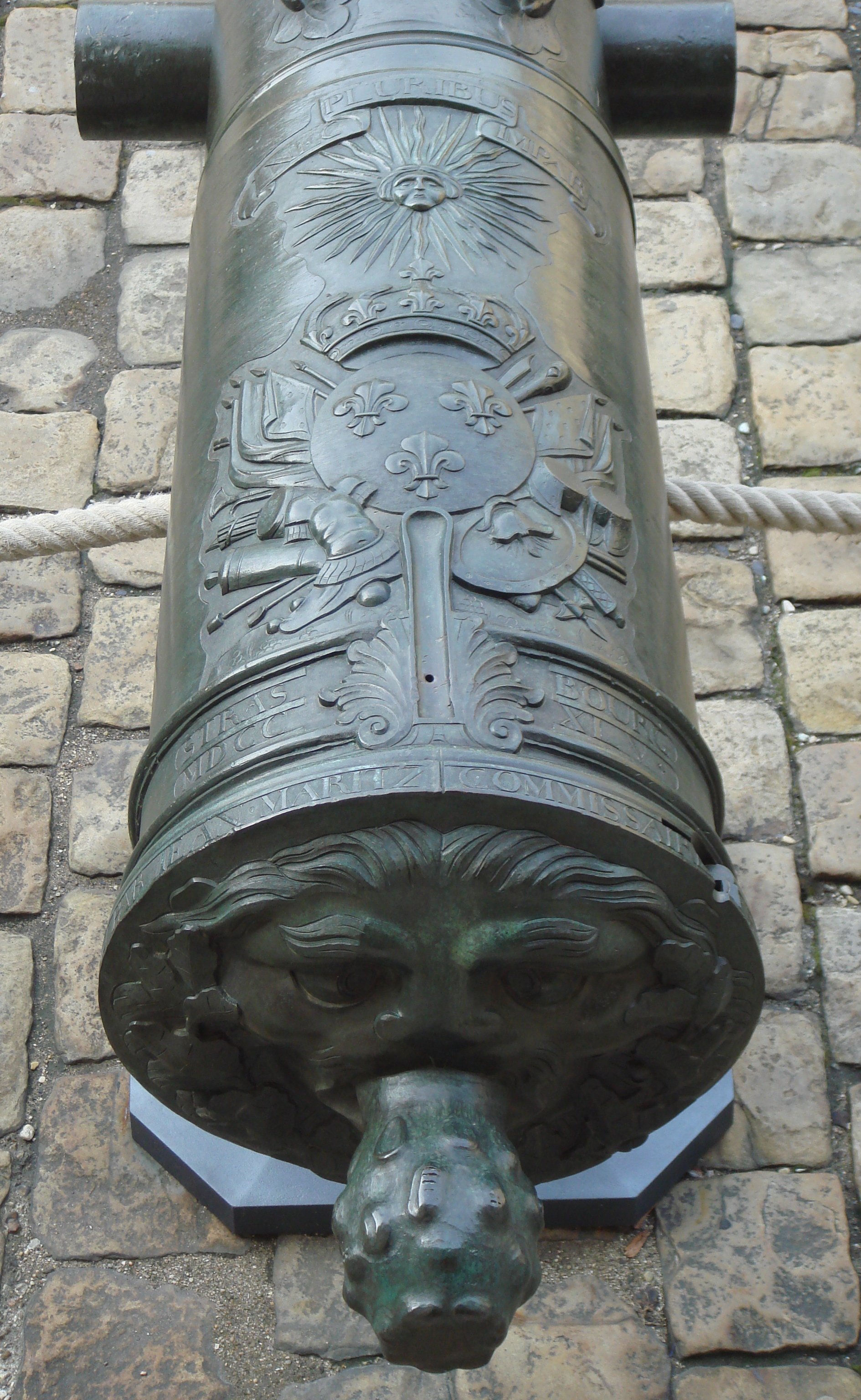 De_Valliere_gun_back